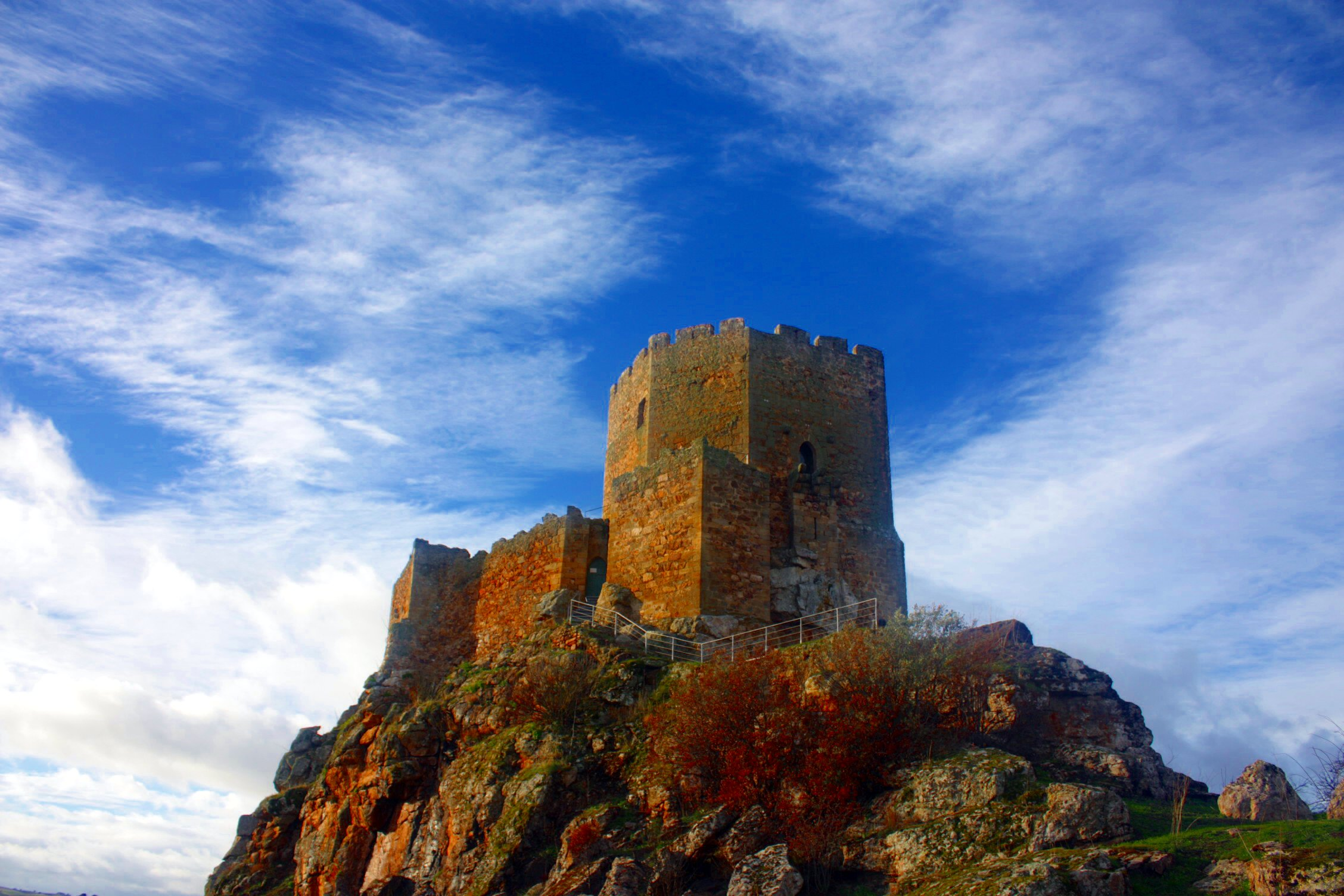 Vista geral. This monument is classified as Imóvel de Interesse Público. This file was uploaded for Wiki Loves Monuments in Portugal with the unique identifier 74124.